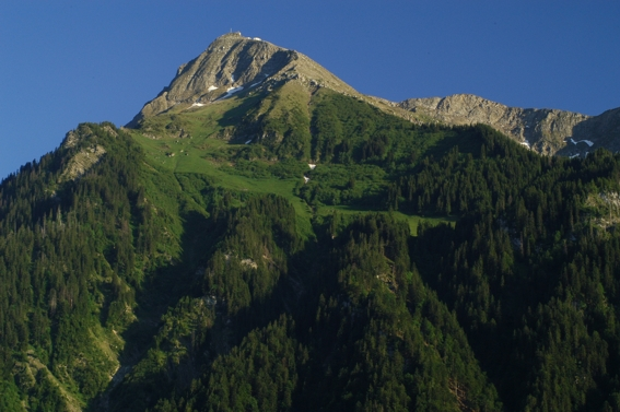 Bildbeschreibung: Der Niesen Kulm aus Wimmis gesehen Quelle: Stefan Grünig, Privatarchiv Fotograf: Bild von Stefan Grünig, CH-3752 Wimmis (Benutzer:Sgruenig) Datum: Juni 2005